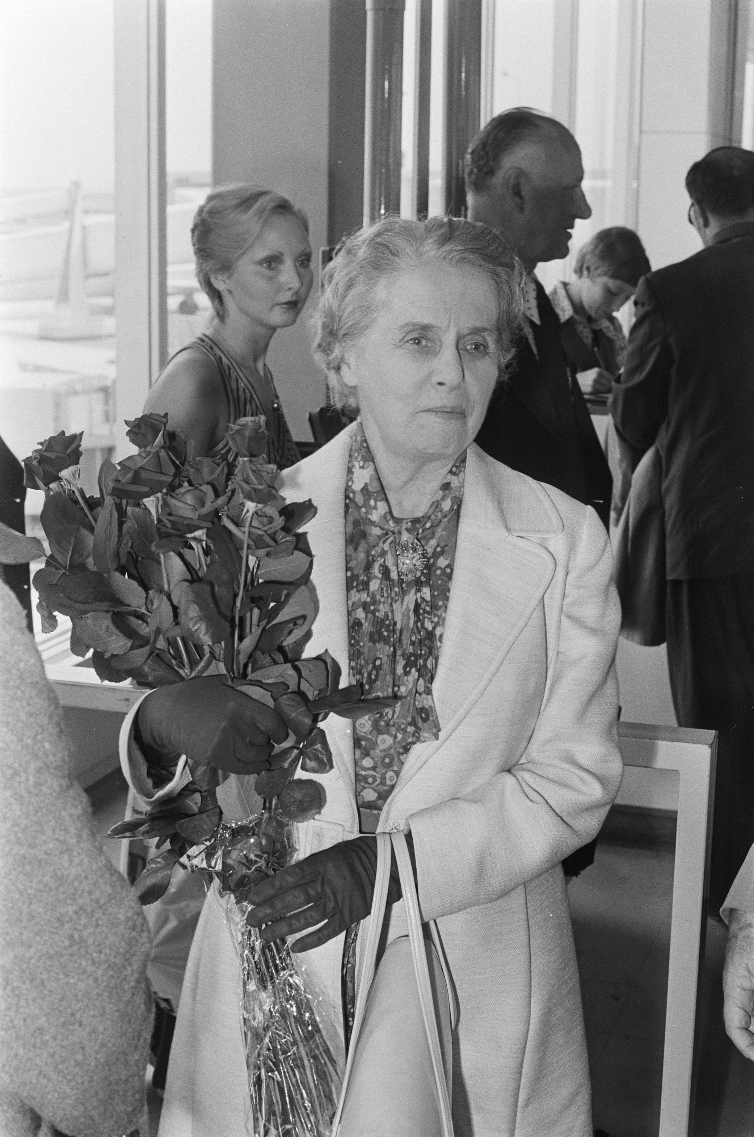 Collectie / Archief : Fotocollectie Anefo Reportage / Serie : [ onbekend ] Beschrijving : Aankomst choreografe Dame Ninette de Vaois op Schiphol, kop Datum : 20 juni 1974 Trefwoorden : aankomsten, choreografen Fotograaf : Croes, Rob C. / Anefo Auteursrechthebbende : Nationaal Archief Materiaalsoort : Negatief (zwart/wit) Nummer archiefinventaris : bekijk toegang 2.24.01.05 Bestanddeelnummer : 927-2695